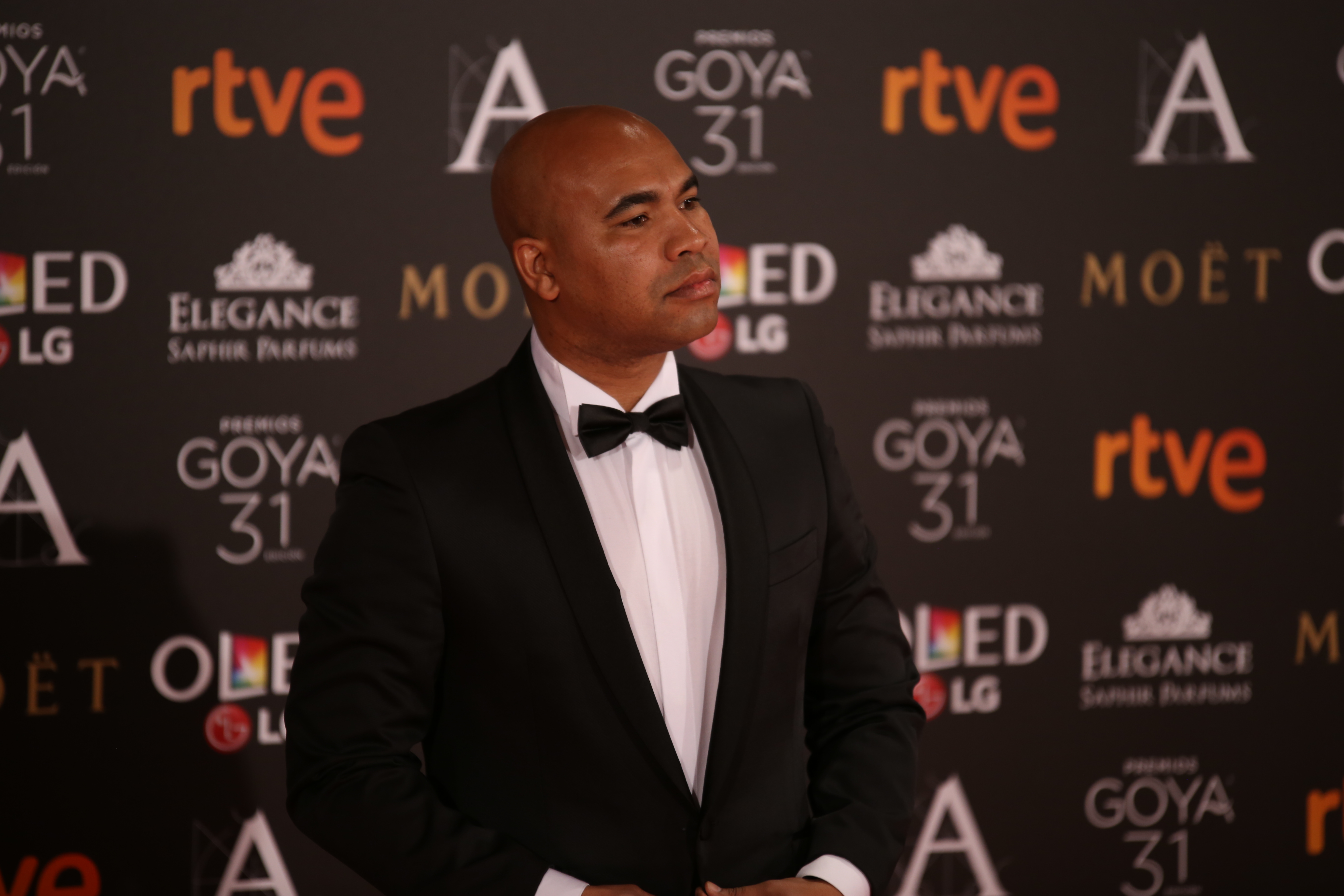 Premios Goya 2017